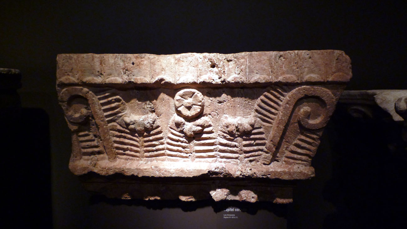 Capitel visigodo (s.VI - VII) procedente de Los Alcázares (Región de Murcia). Museo arqueológico de Murcia.